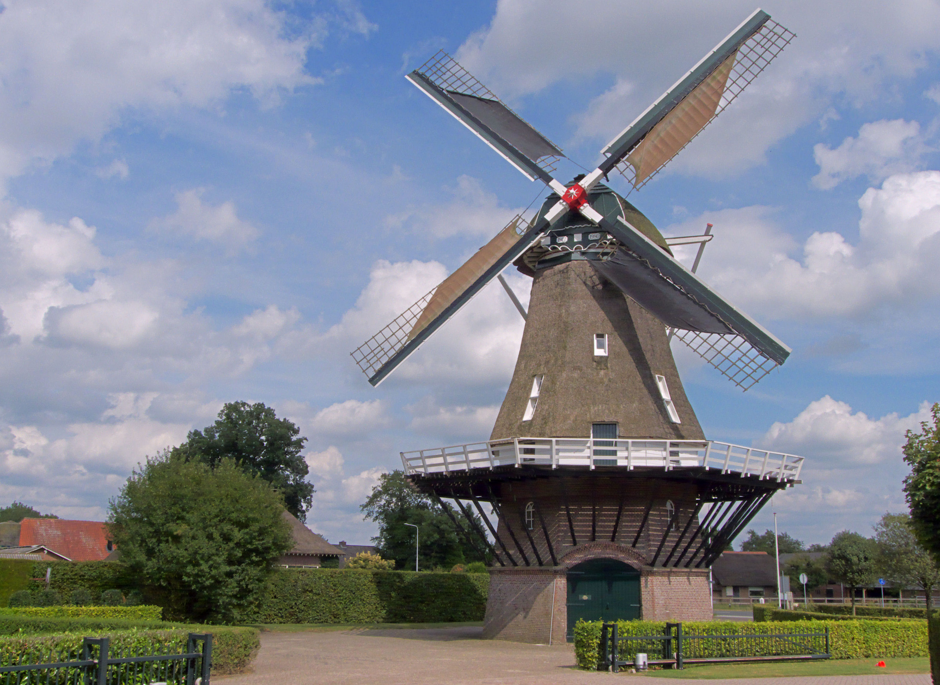 Walderveense molen